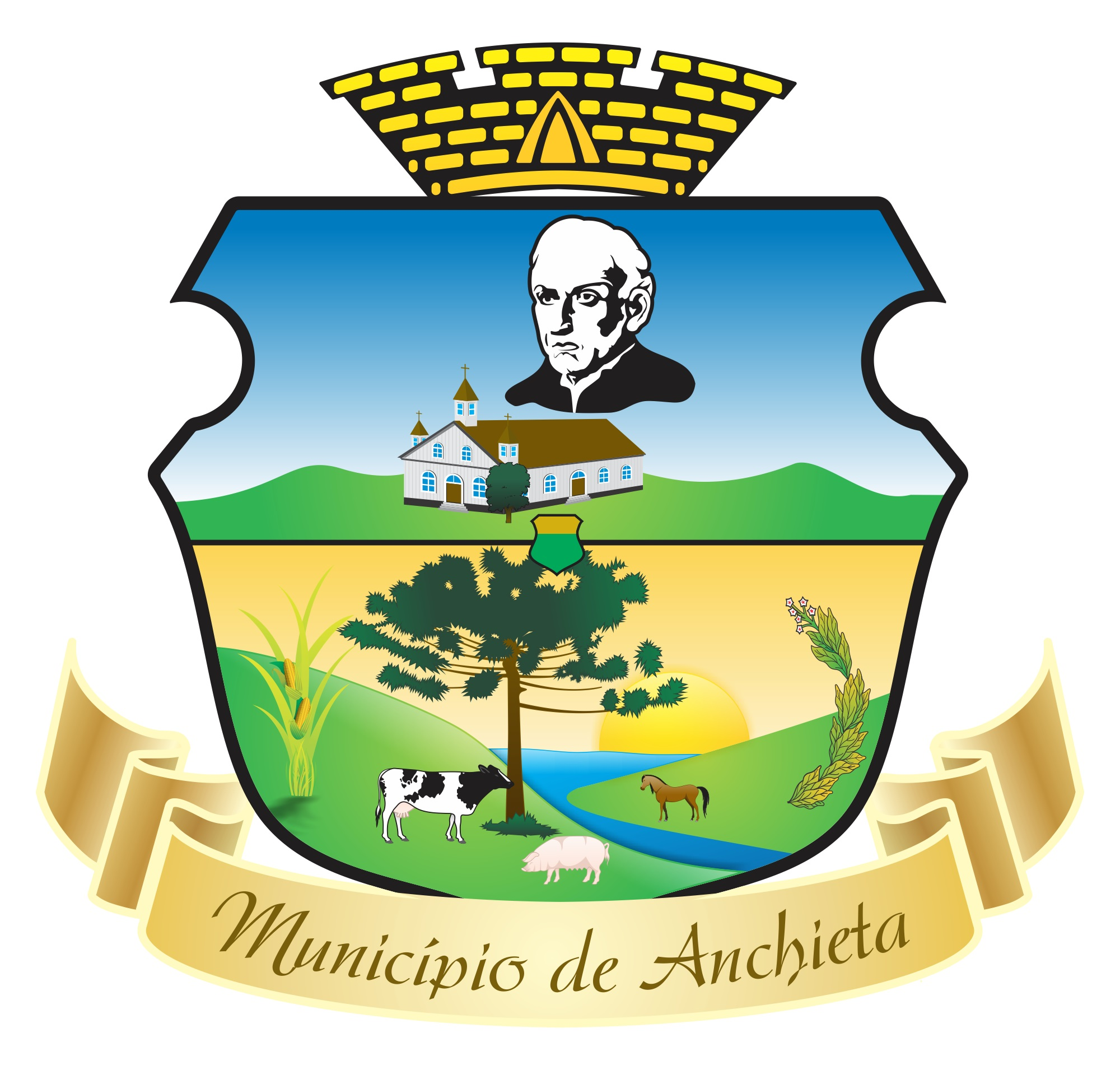 Blason de la municipalité de Anchieta - SC - Brésil